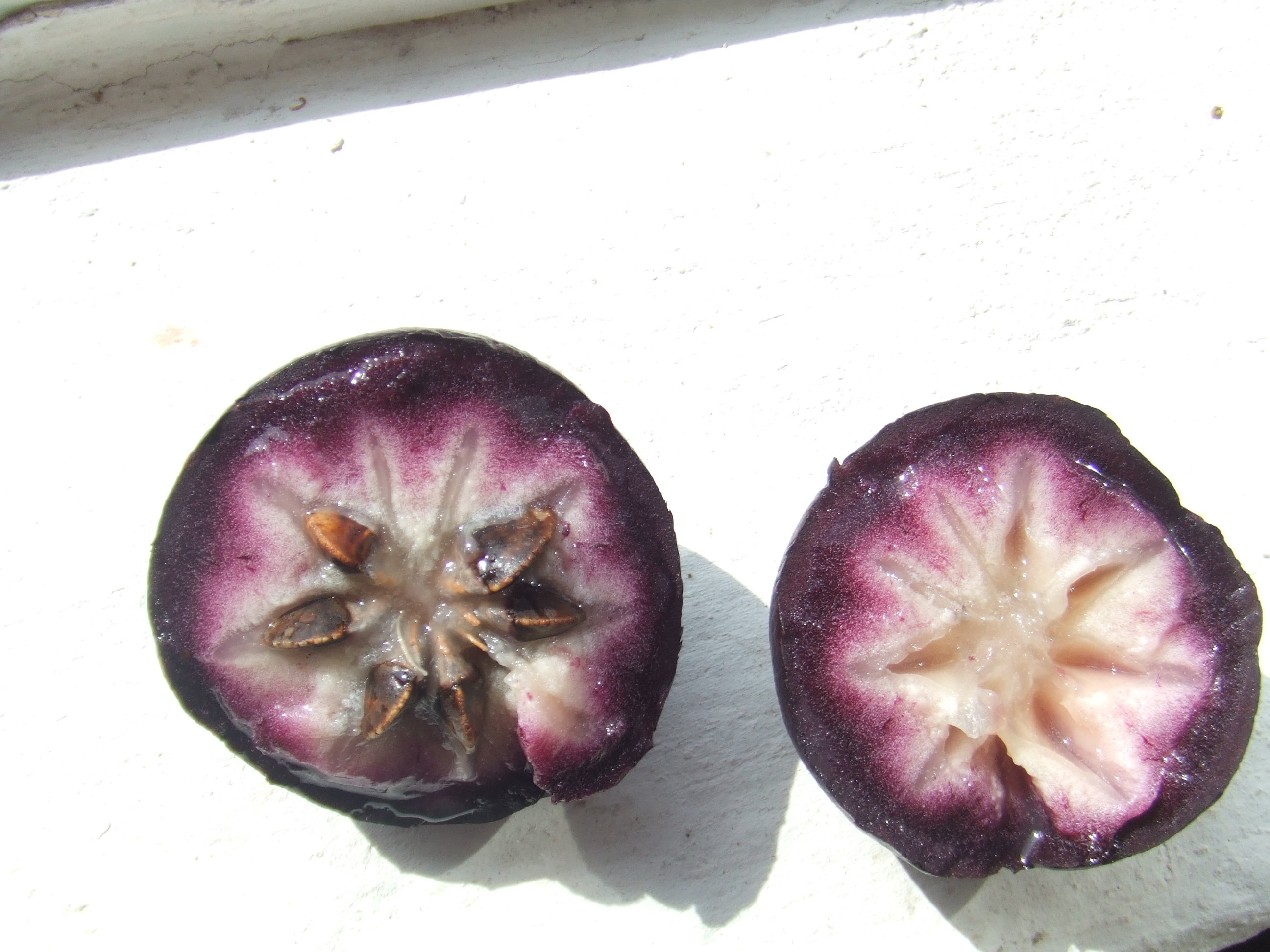 Caimito picado Chrysophyllum cainito cut in half